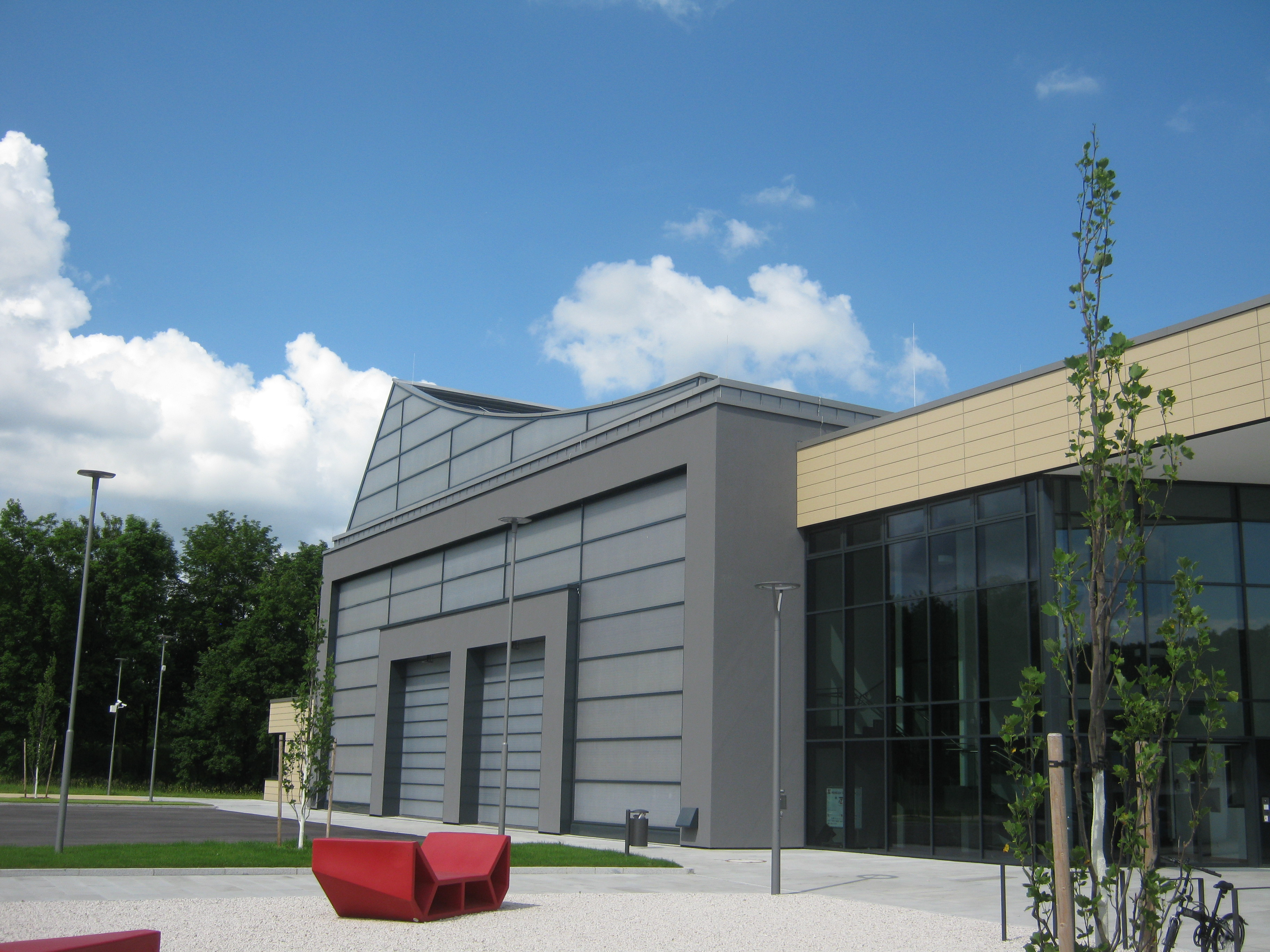 Technologiezentrum PULS Dingolfing Westseite